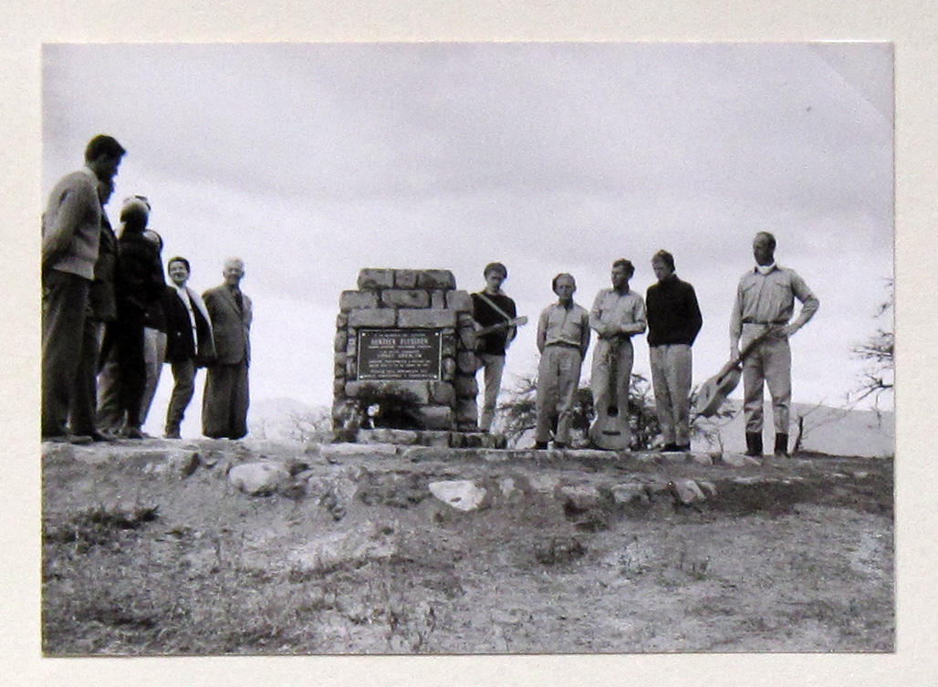 Bau des Plüschow-Denkmals im April 1962